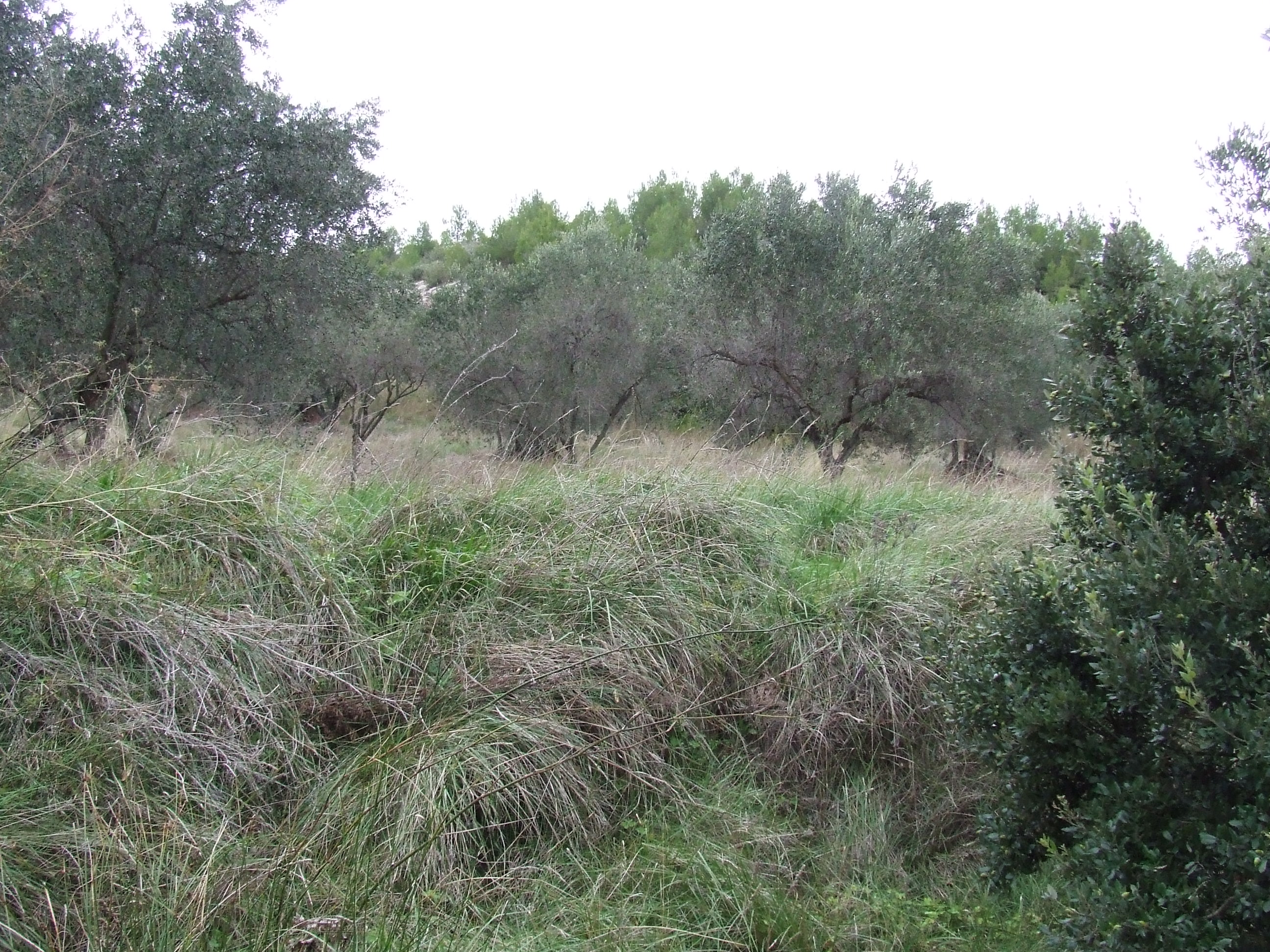 Turó d'en Xifreda (Riells del Fai, Bigues i Riells, Vallès Oriental)